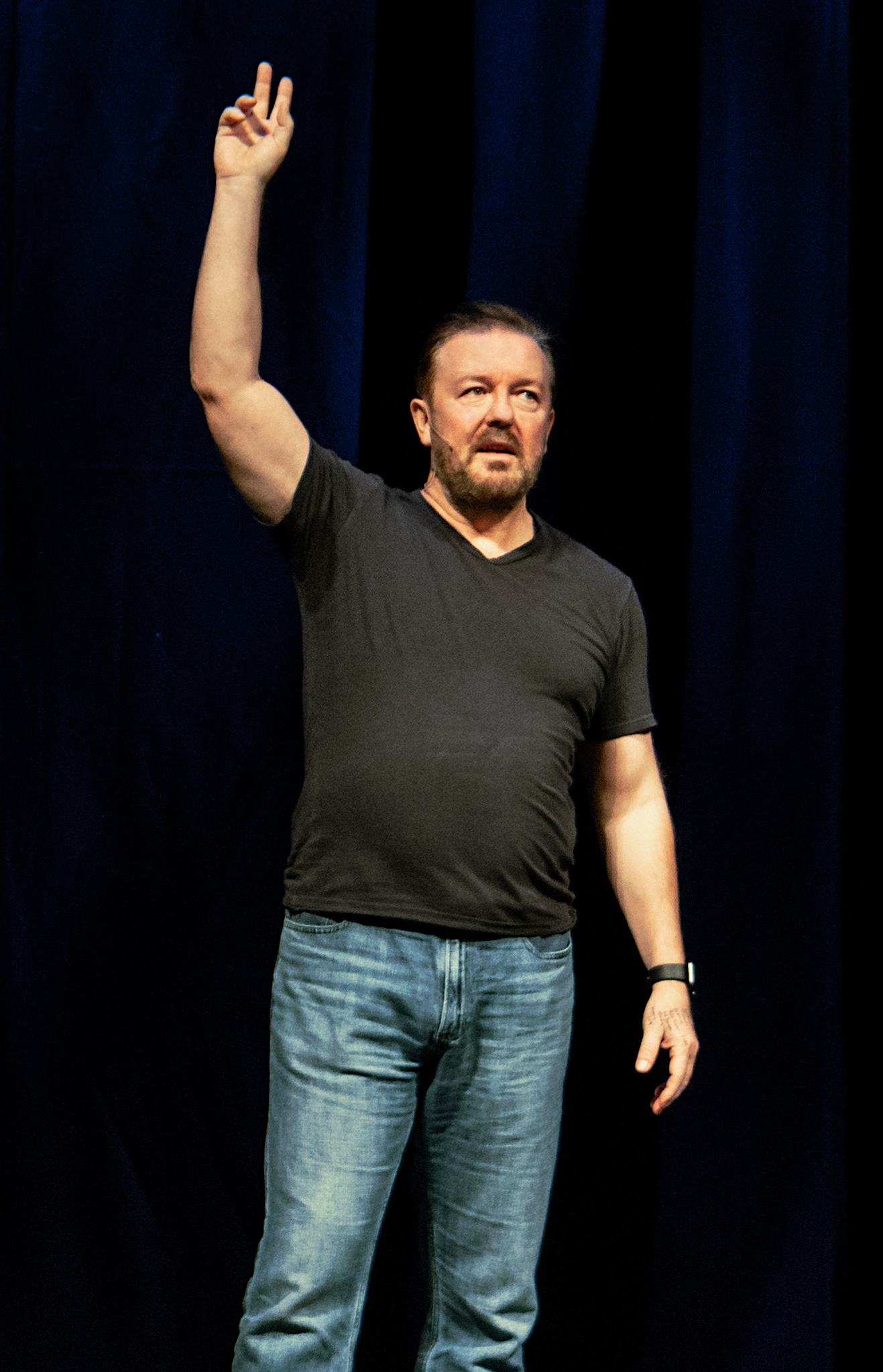 GervaisBlooms021218-21